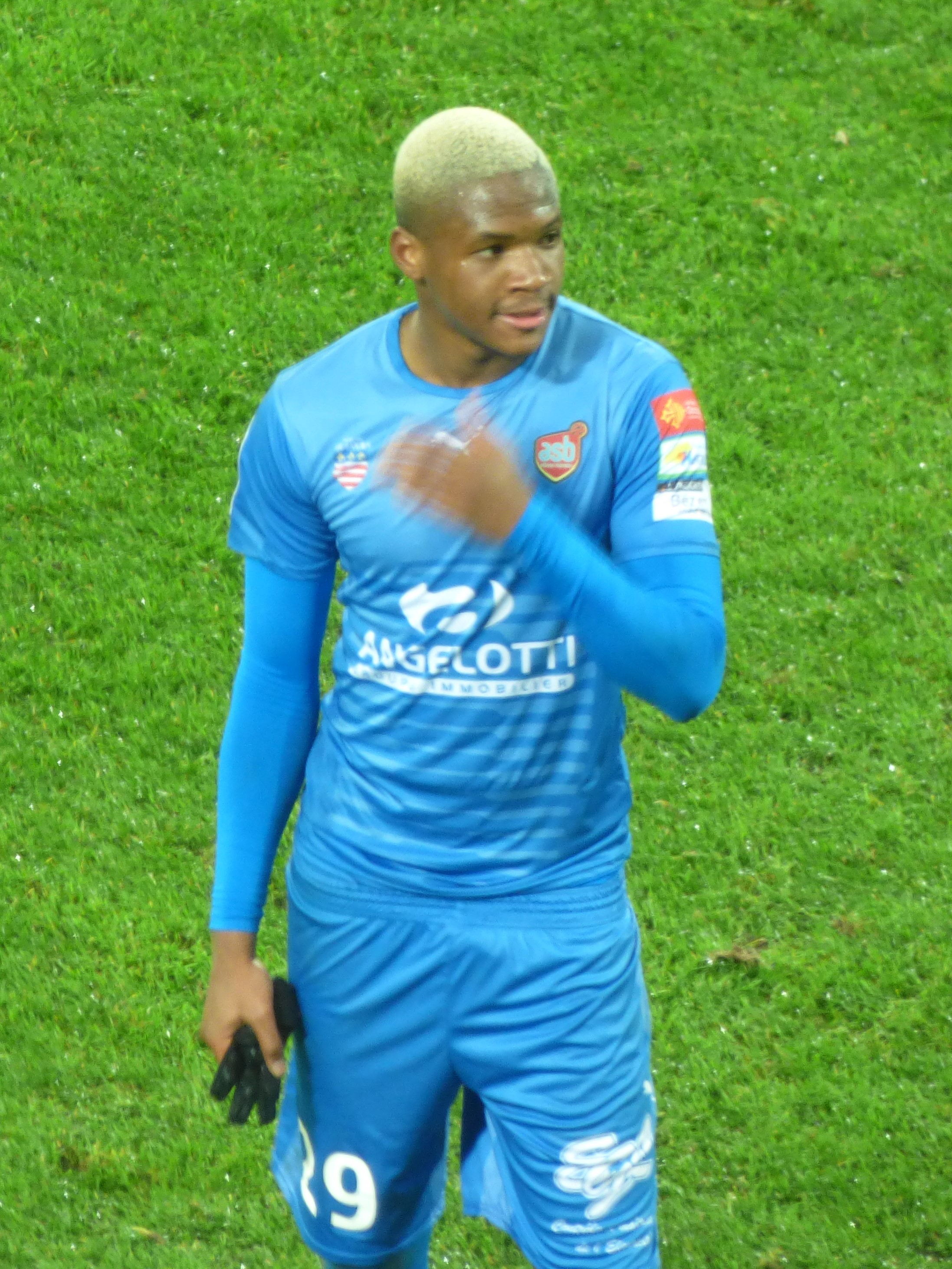 Ibrahima Savane après le match RC Lens / AS Béziers, comptant pour la 23ème journée du championnat de France de football de Ligue 2 2018-2019, le 4 février 2019, au Stade Bollaert-Delelis.